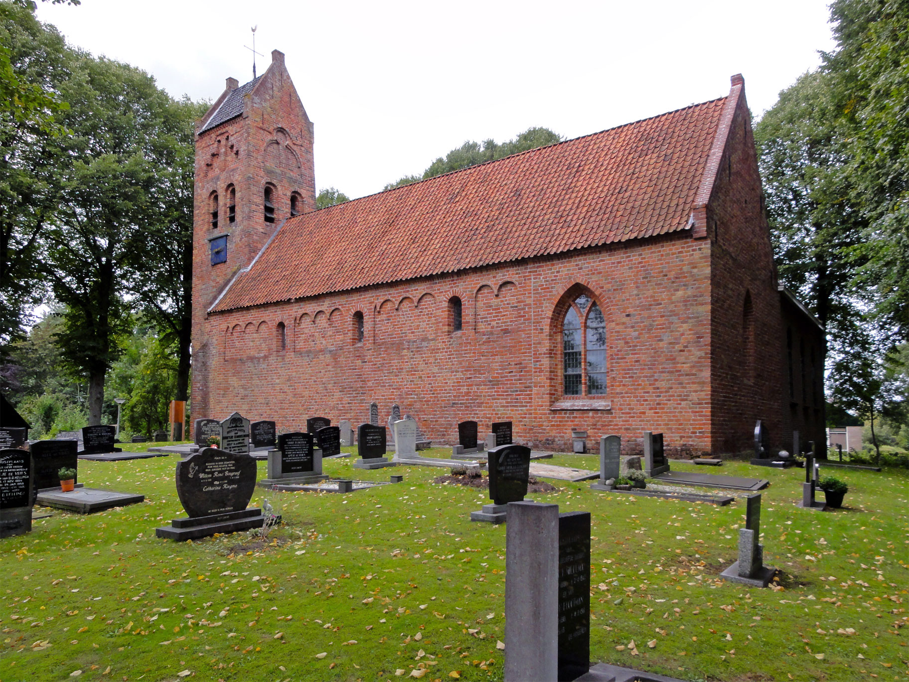 Sint Bonifatiuskerk Damwoude